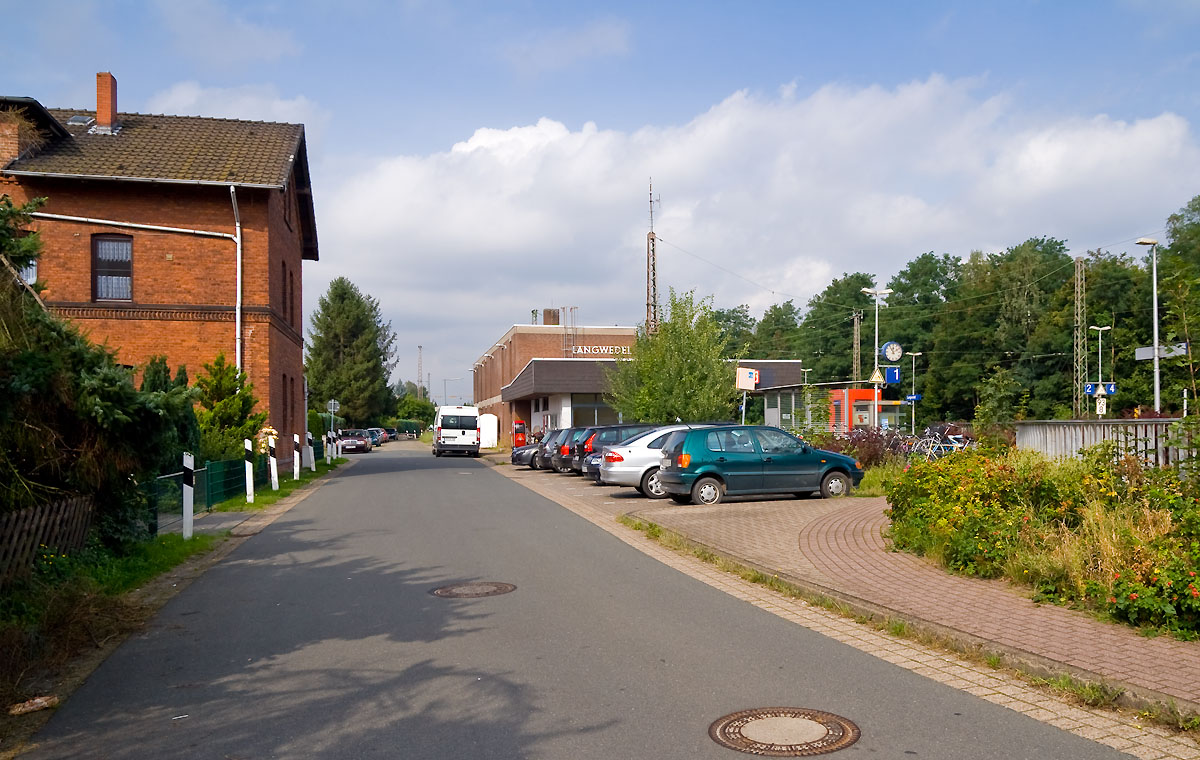 Bahnhof Langwedel: An der schmalen Zufahrtsstraße befindet sich ein kleiner P+R-Parkplatz. An Stelle des Empfangsgebäudes und des Güterschuppens steht im Bahnhof Langwedel das Stellwerk Lf. Davor ist ein kleiner Anbau, in dem sich ein Warteraum für die Fahrgäste und Diensträume für das Bahnpersonal befinden. Das rote Backsteingebäude links ist ein ehemaliges Bahnbeamtenwohnhaus.